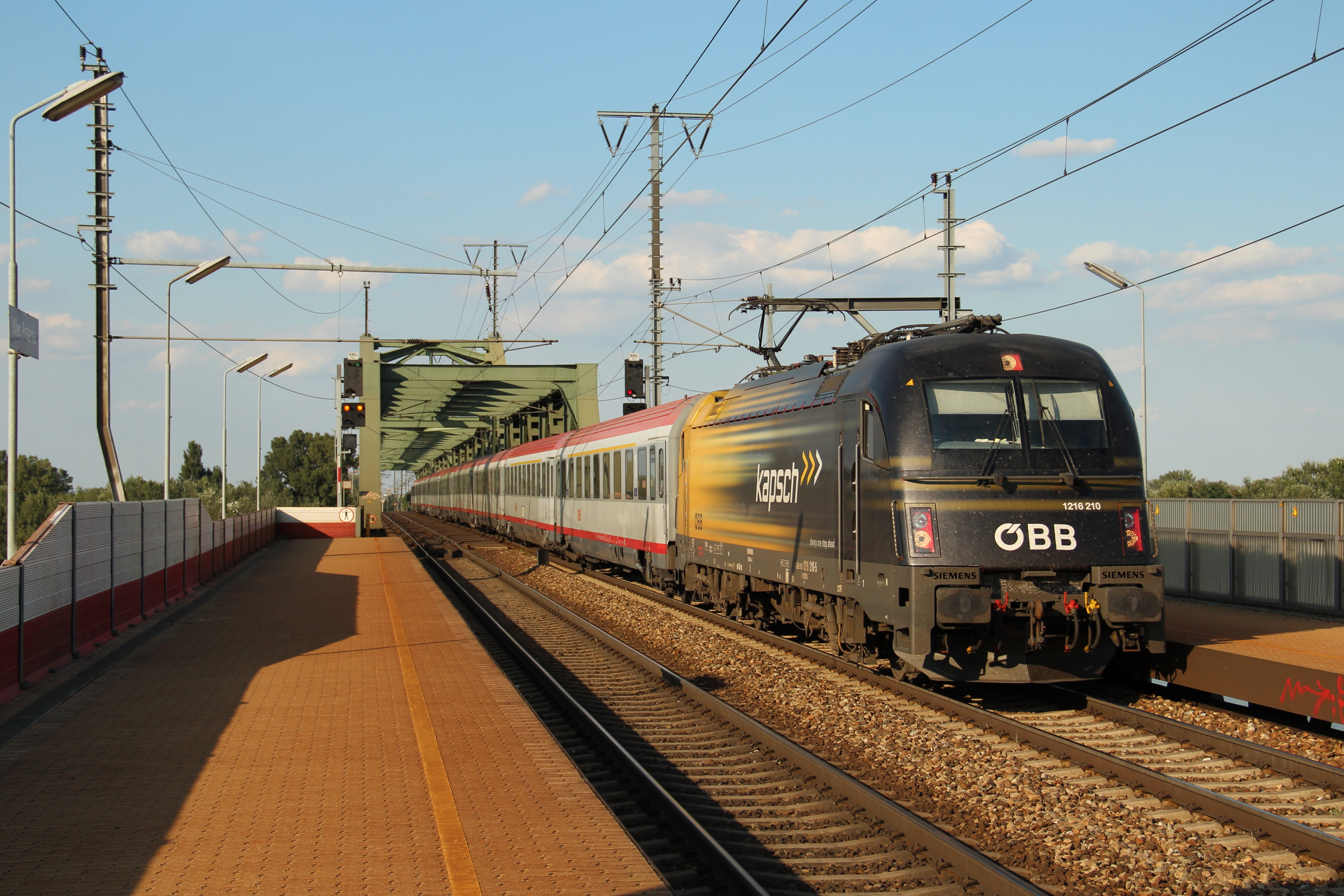 Die 1216.210 "Kapsch" durchfährt mit dem EC 173 Hamburg - Villach die Haltestelle Wien Praterkai, im Hintergrund die Donaubrücke.